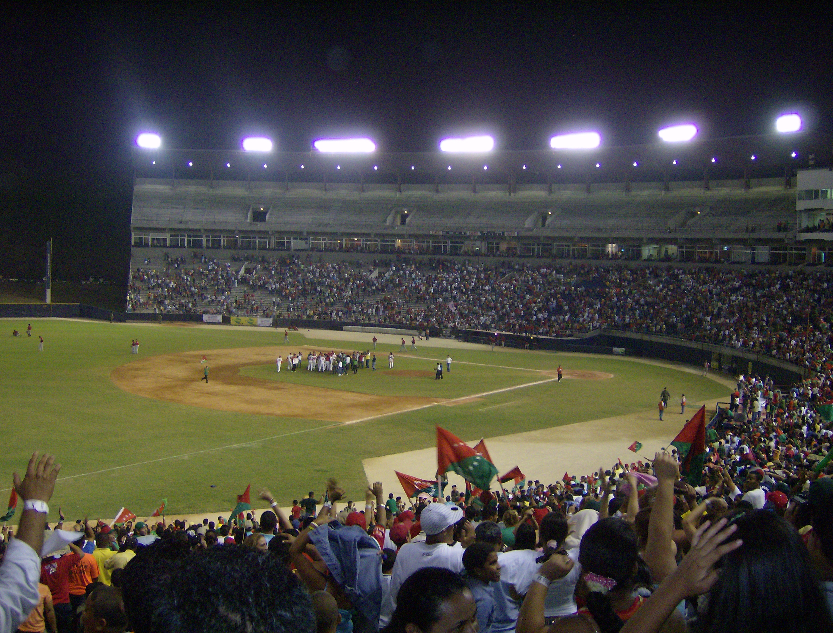 Vista lateral interna del Estadio Rod Carew